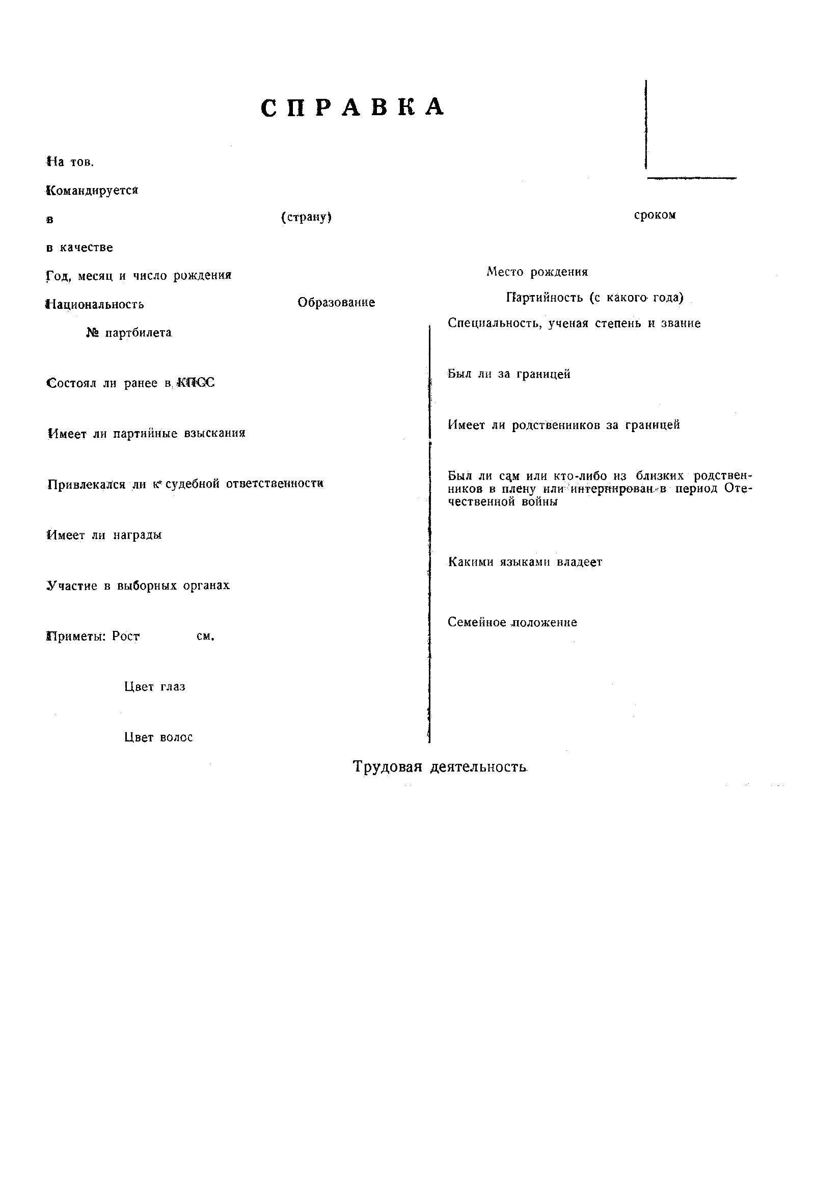 Бланк справки для оформления выездной визы из СССР.